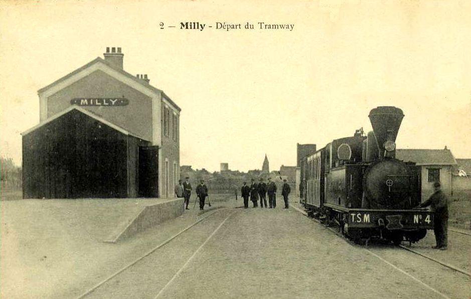 Train au départ avec la locomotive n° 4.